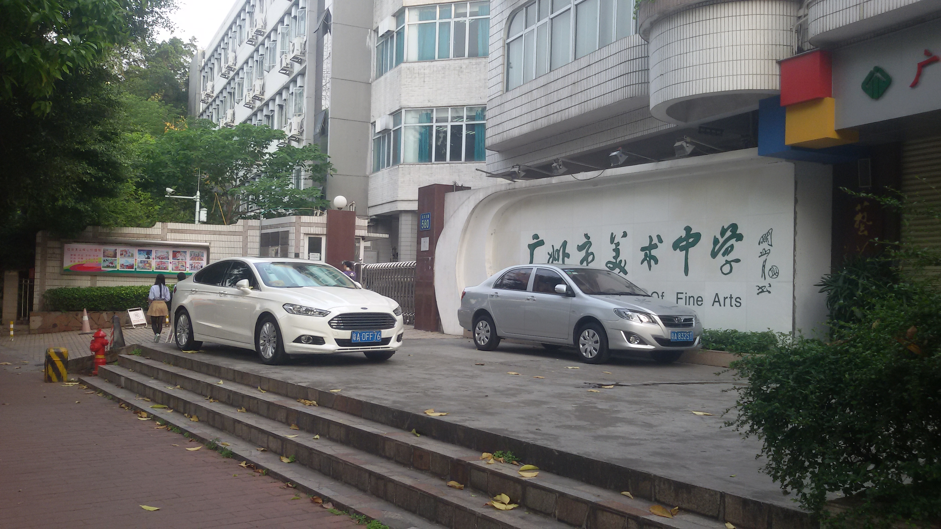 粵語: 广州市美术中学嘅正门